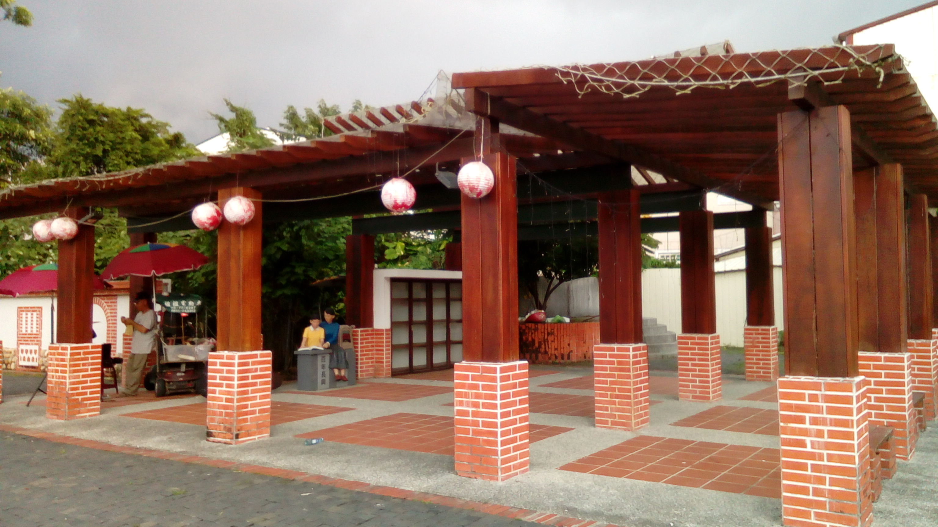 位於長興國小前